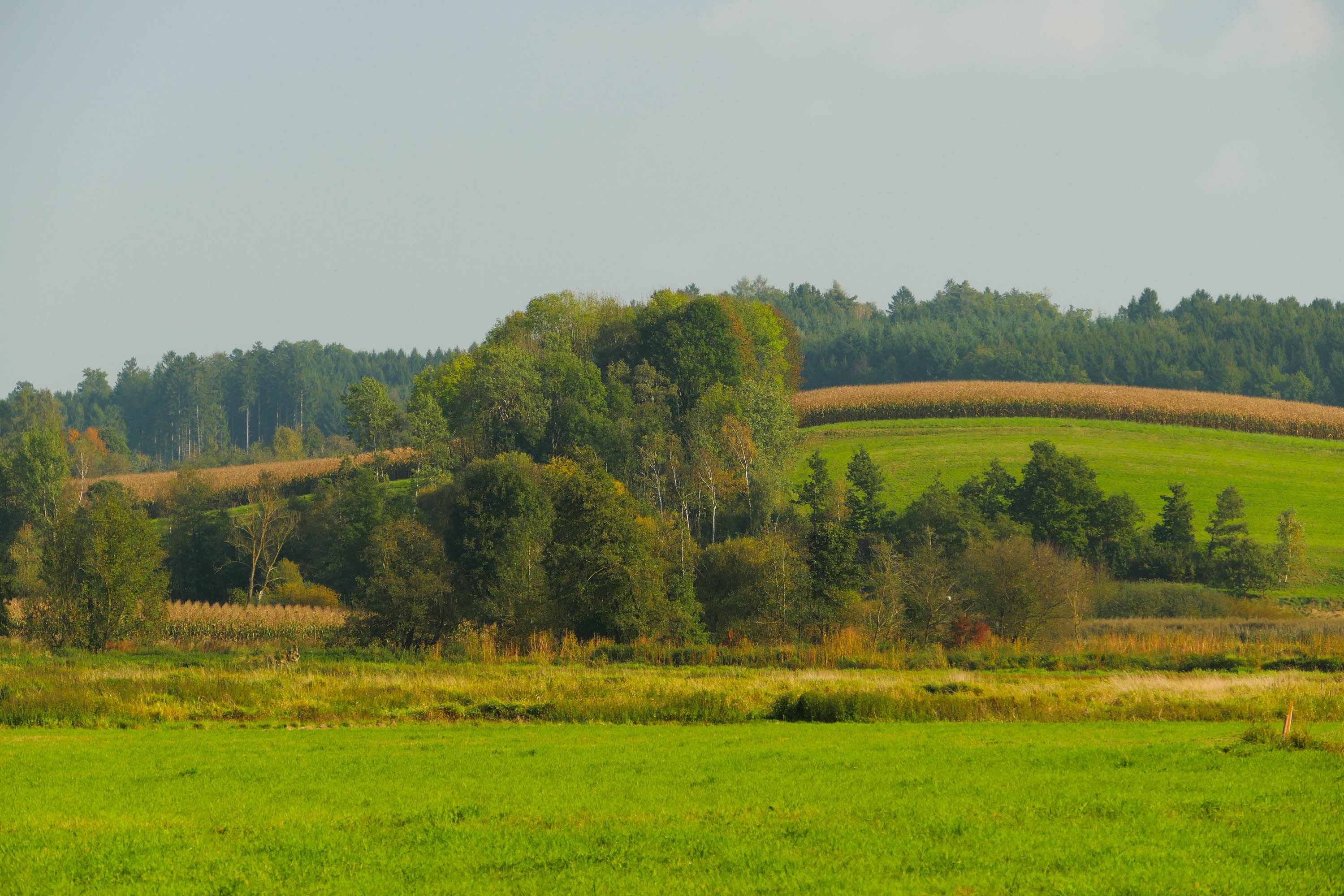 Koaserin This media shows the nature reserve in Upper Austria with the ID n121.